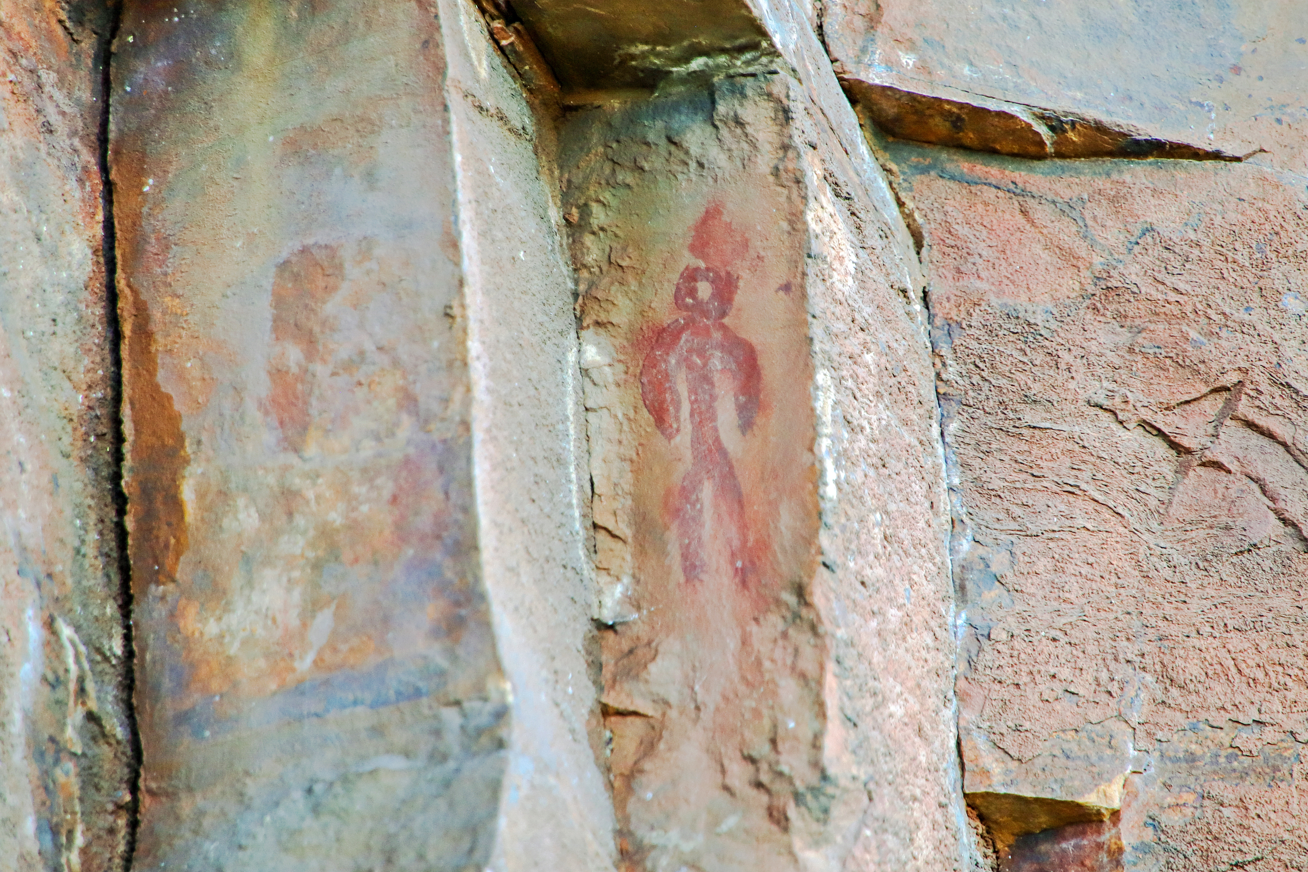 Sésamo es una localidad que pertenece al municipio de Vega de Espinareda, comarca de El Bierzo, provincia de León.